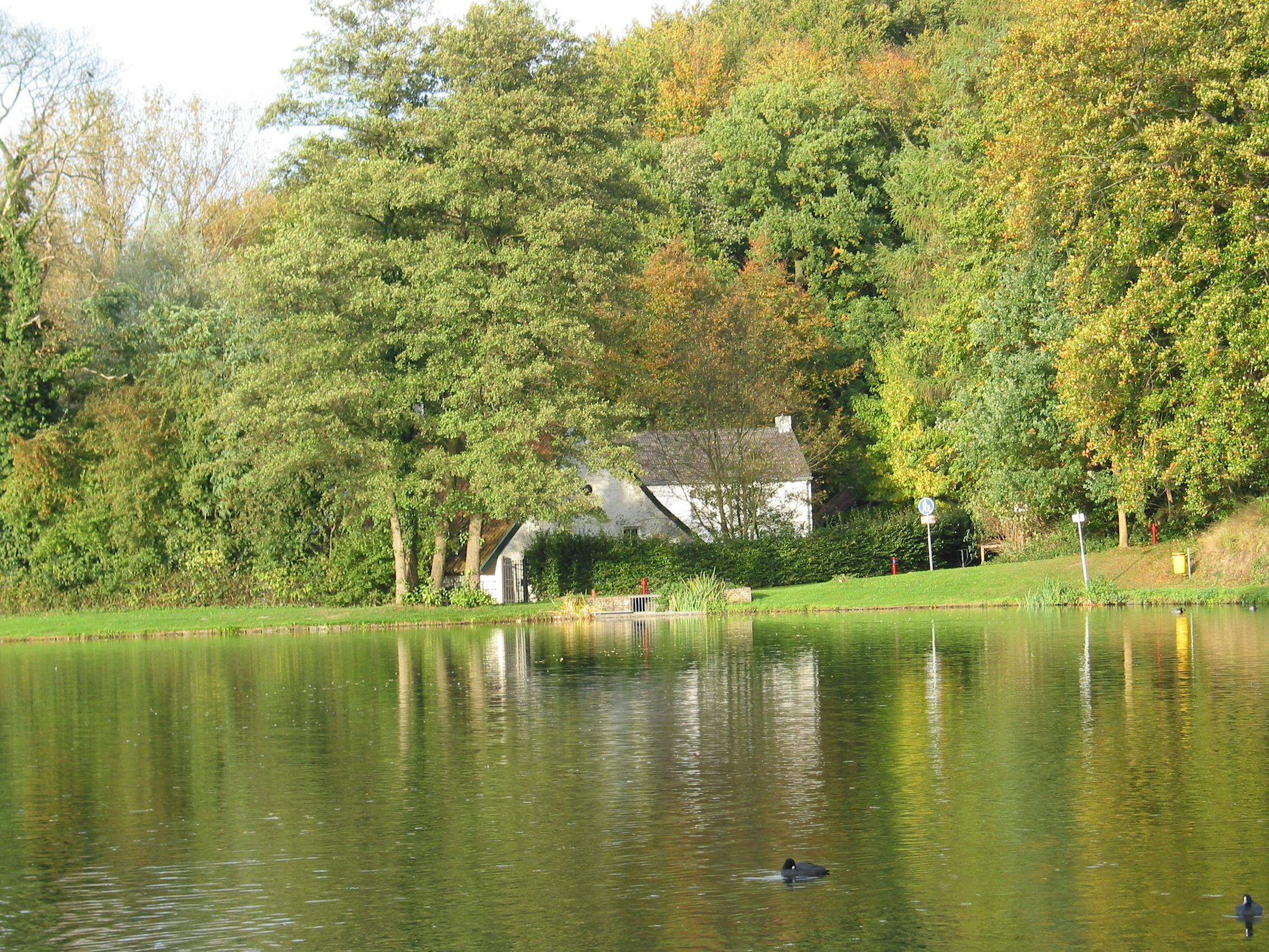 De vijver bij Kasteel Strijthagen met uitzicht op de Strijthagermolen.